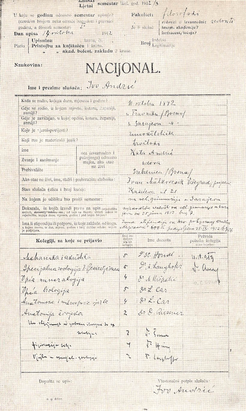 Nacijonal (prijavnica) o upisu u prvi semestar Filozofskog fakulteta Sveučilišta u Zagrebu , koj(u)eg je Ivo Andrić vlastoručno potpisao u Zagrebu 14. listopada 1912